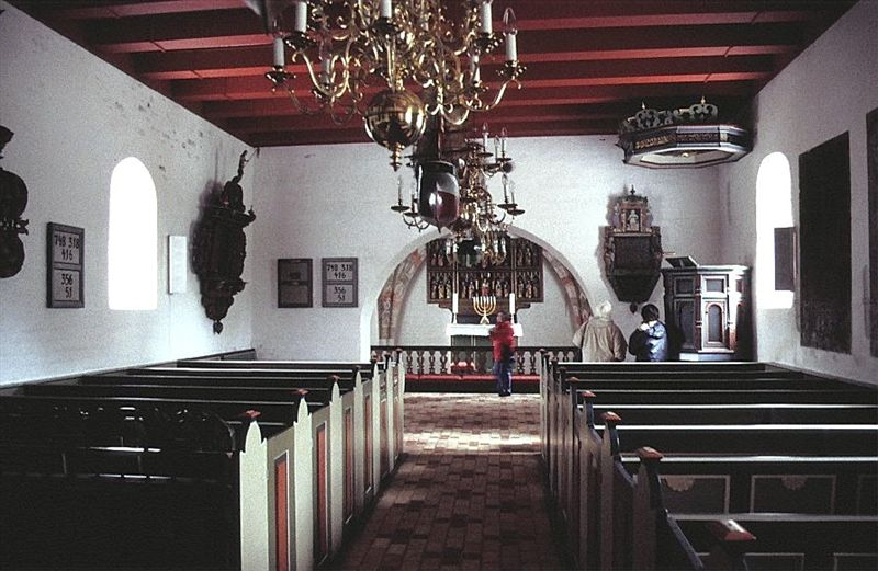 Vesterø Kirke i Danmark. Skibet set mod øst